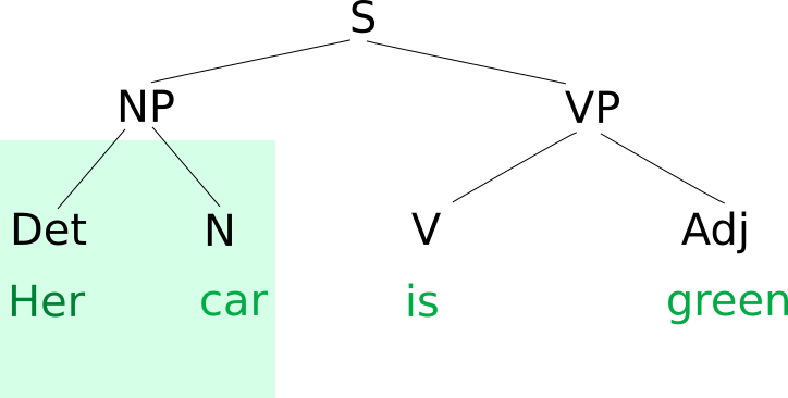 Miejsce zaimka jako przydavka